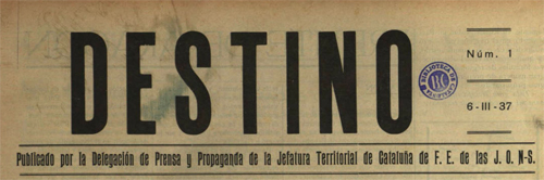 Capçalera núm. 1 de la revista Destino que es conserva a la Biblioteca de Catalunya